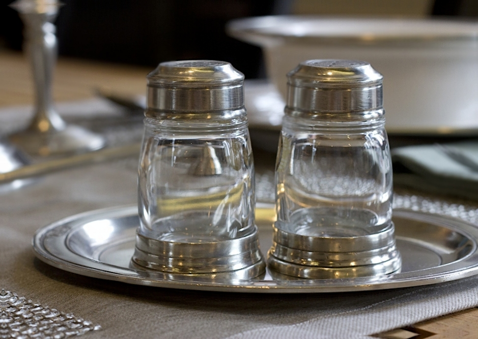 Plattmenage, bestehend aus einem Metalluntersatz mit je einem Salz- und Pefferstreuer als Set